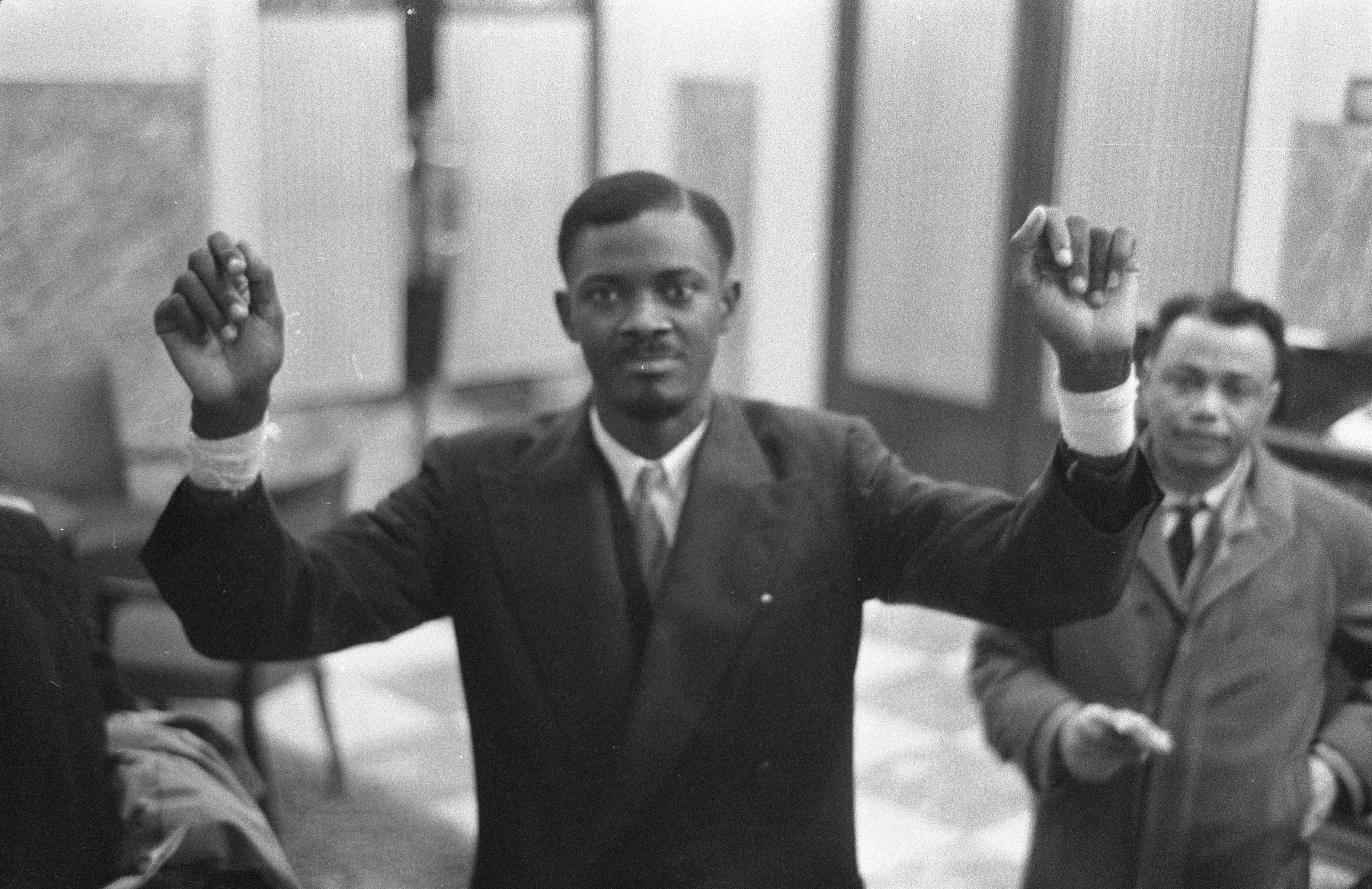 De Congolese leider Patrice Loemoemba in Brussel Datum 26 januari 1960 Locatie België, Brussel